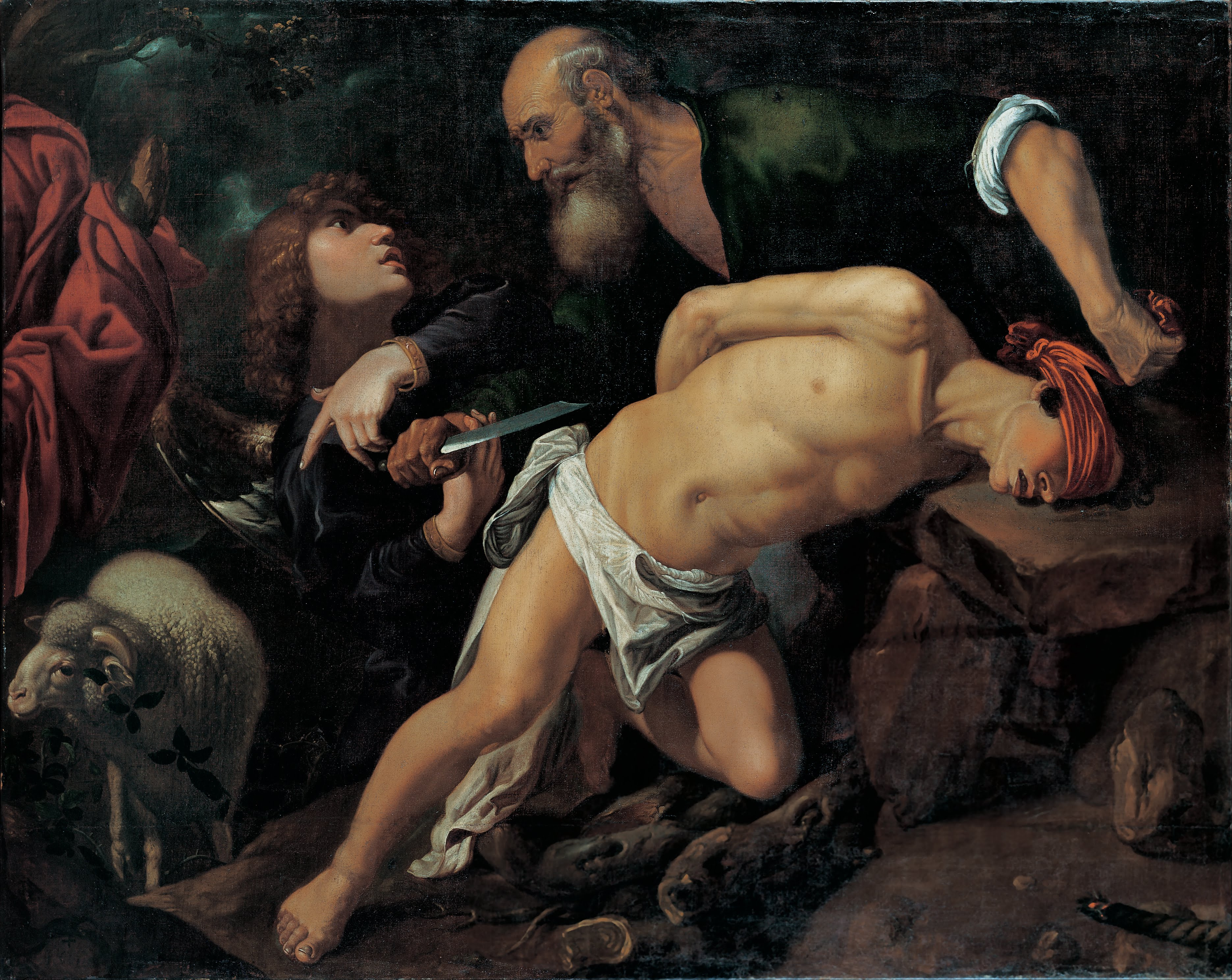 La obra representa al patriarca Abraham disponiéndose a sacrificar, por mandato de Dios, a su hijo Isaac, aunque Yahve, tras comprobar la fidelidad de Abraham a sus mandatos, impidió que el sacrificio se llevara a cabo.